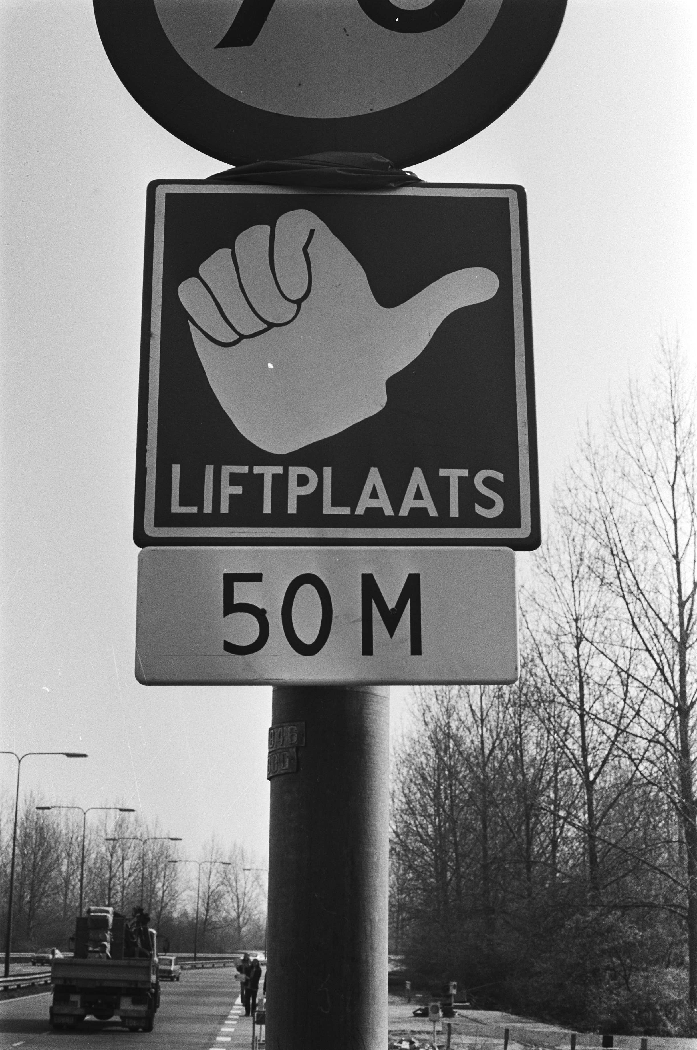 Collectie / Archief : Fotocollectie Anefo Reportage / Serie : [ onbekend ] Beschrijving : aan de Gooiseweg in Amsterdam 1e officiele liftplaats van Nederland in gebruik genomen, bord dat de liftplaats aangeeft Datum : 10 april 1981 Locatie : Amsterdam, Noord-Holland Trefwoorden : borden, liftplaatsen Persoonsnaam : gooiseweg Fotograaf : Smirren, […] van / Anefo Auteursrechthebbende : Nationaal Archief Materiaalsoort : Negatief (zwart/wit) Nummer archiefinventaris : bekijk toegang 2.24.01.05 Bestanddeelnummer : 931-4254